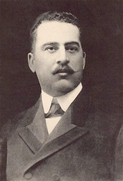 Foto del General Carlos Felipe Morales Languasco, Presidente de la República Dominicana (1903-1906)